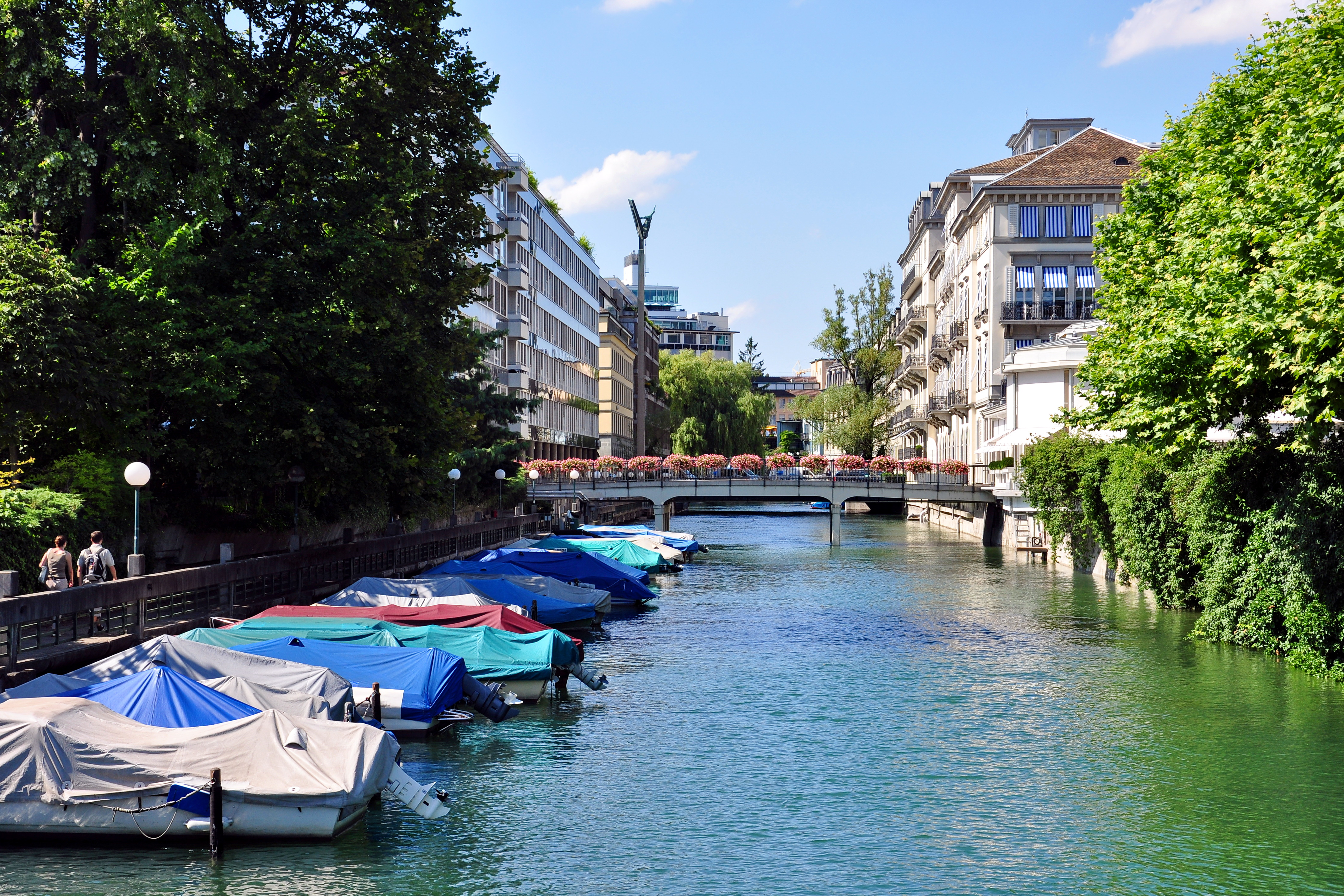 Schanzengraben in Zürich (Switzerland), as seen from General-Guisan-Quai, Hotel Baur au Lac to the right.